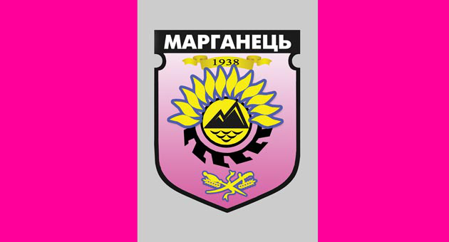 Прапор Марганця